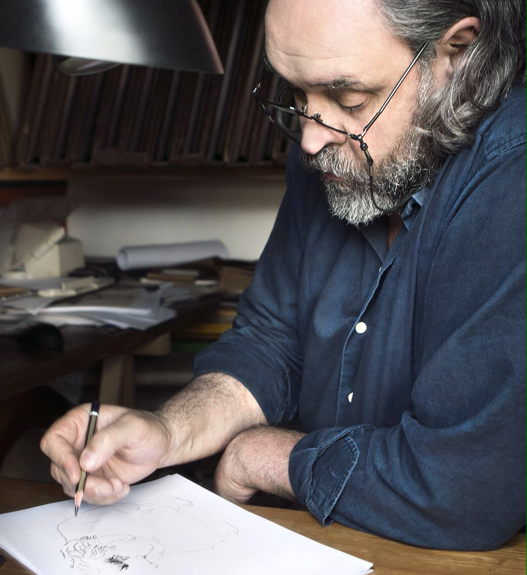 Rodolfo Arotxarena in his studio